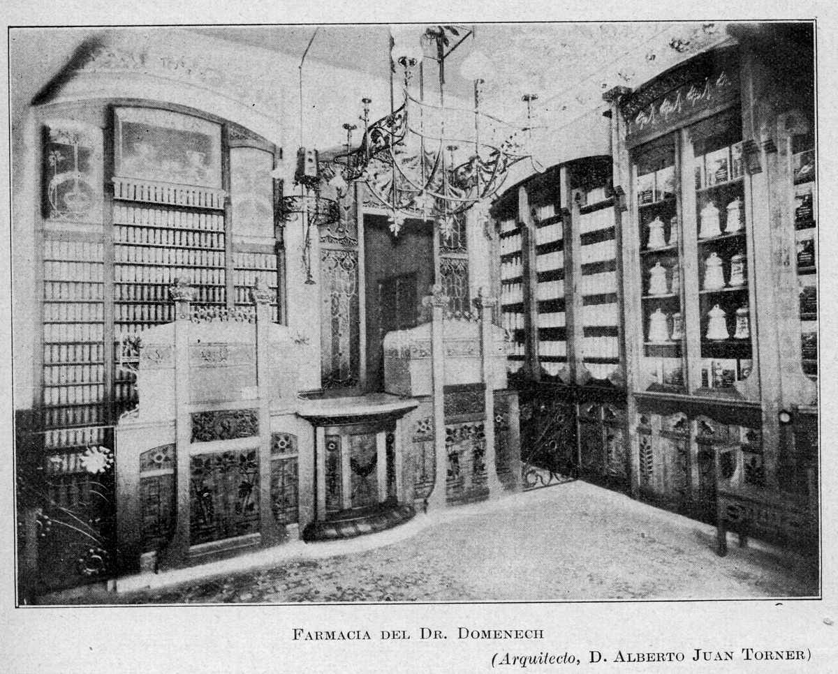 Farmàcia del Dr. Domènech ubicat a la Ronda de Sant Pau 71 (Barcelona, Catalunya). Disseny d'Albert Juan i Torner de 1907. Va guanyar el premi anual de l'Ajuntament de Barcelona.